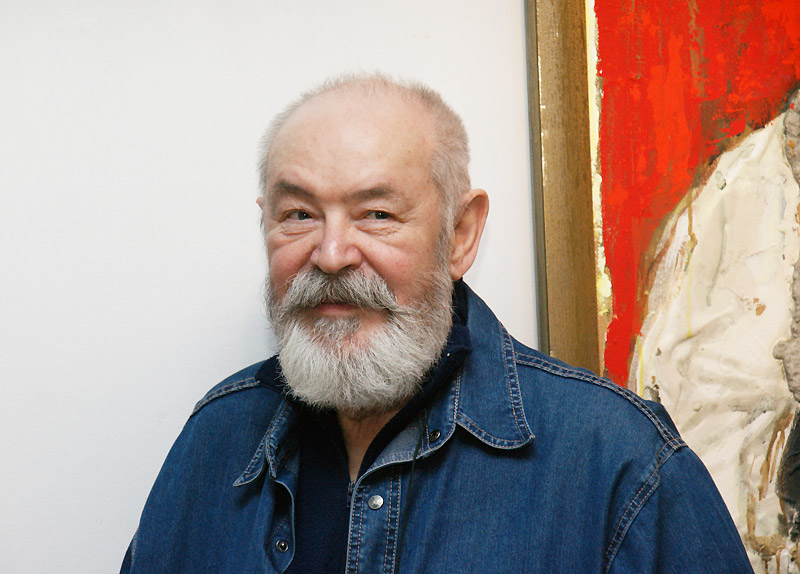 Алексей Штерн на своей персональной выставке в музее современного искусства Эрарта, 17.03.2015